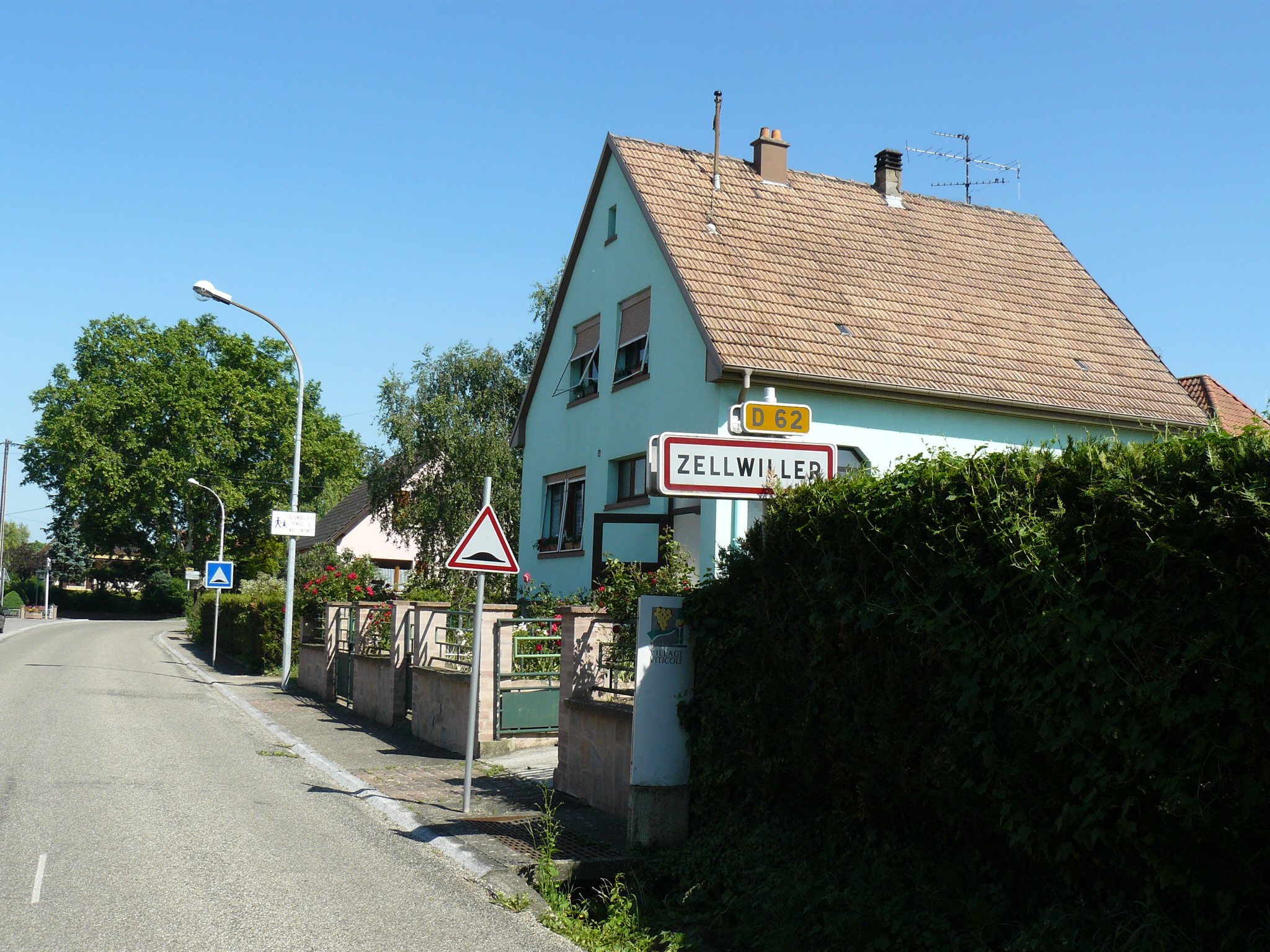 Entrée du village de Zellwiller par la départementale 65